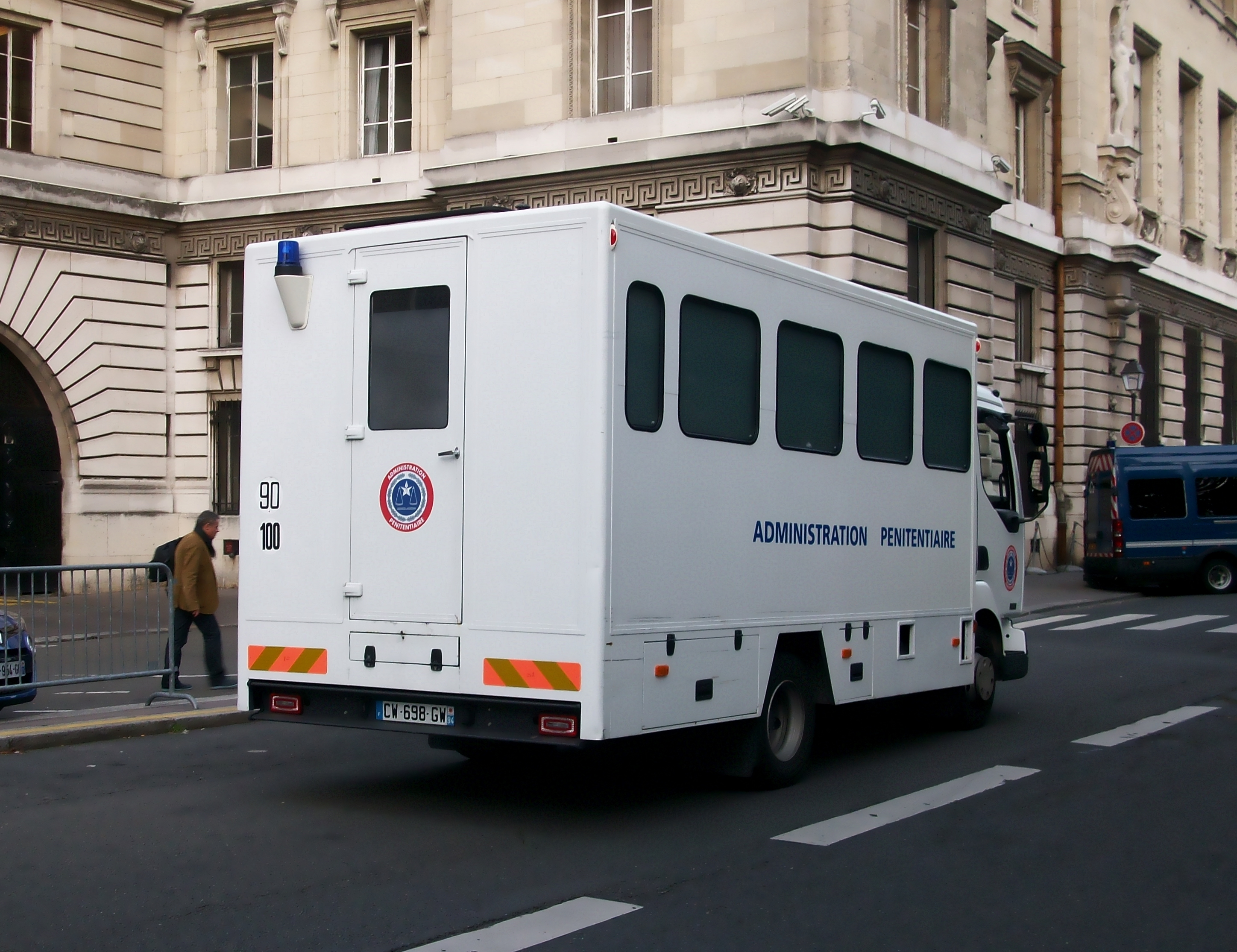 Camion de l'administration pénitentiaire à Paris